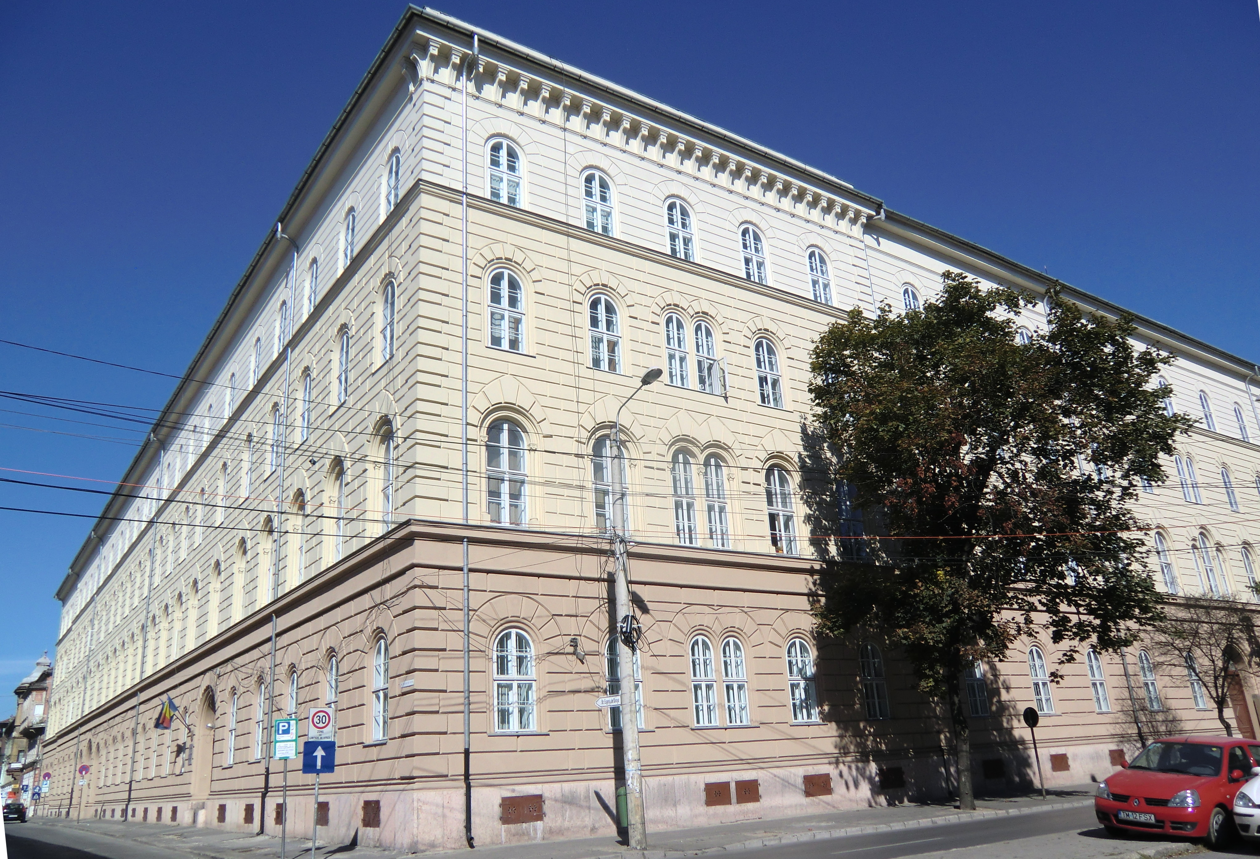 Dikasterialpalais